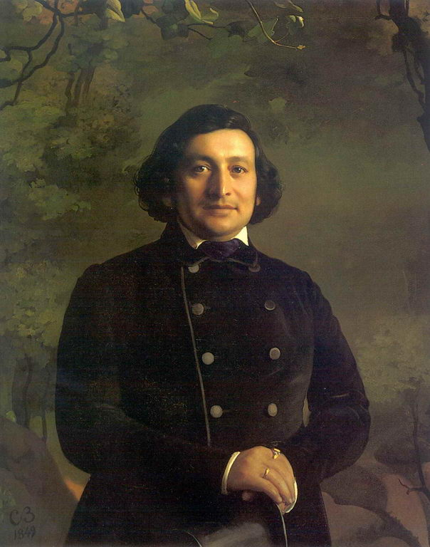 Портрет оперного артиста Осипа Афанасьевича Петрова. 1849г.